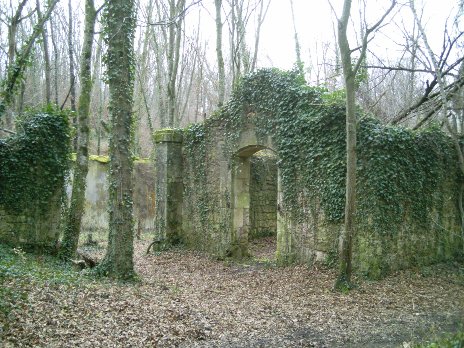 Ruines de la poudrière de Bois sous Roche